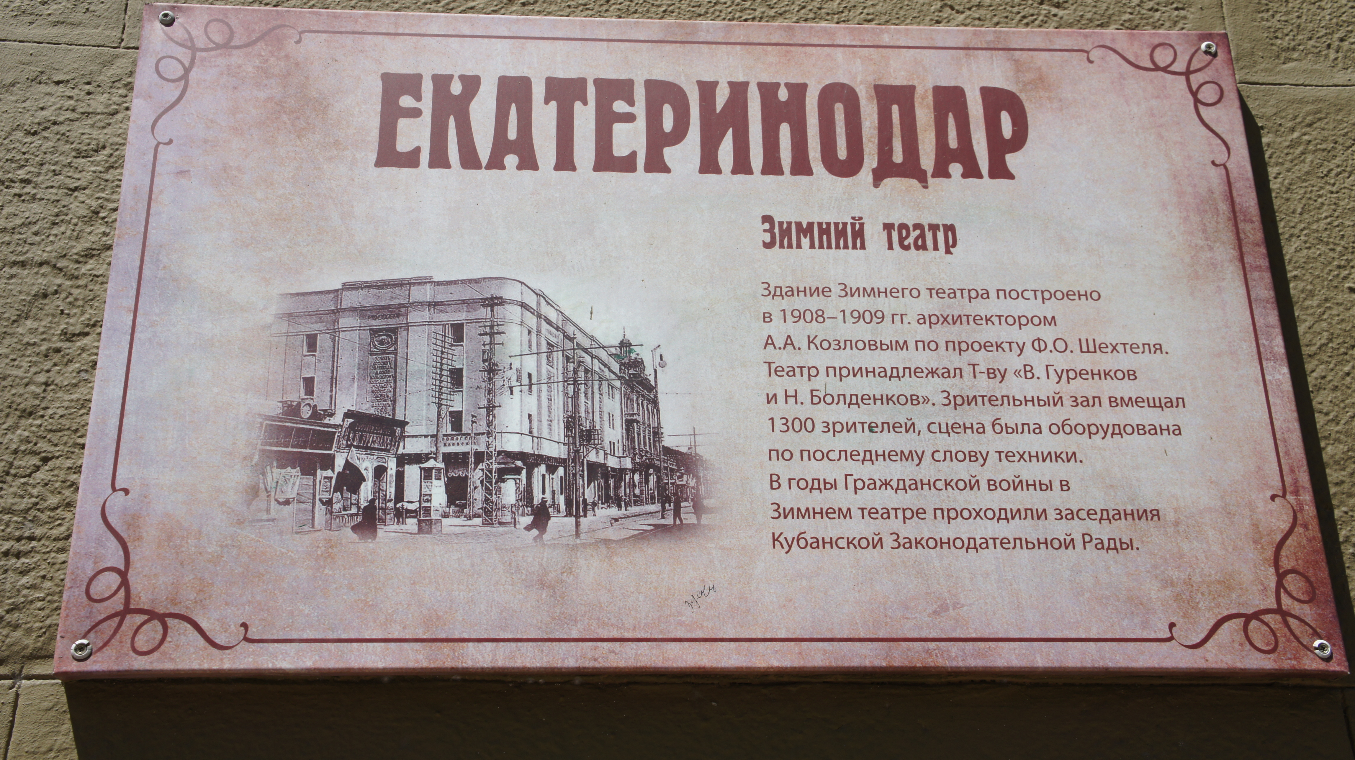 Здание зимнего театра. здесь проходили съезды советов, на которых были приняты решения о создании кубано-черноморской советской республики и северо-кавказской советской республикии выступал орджоникидзе г. к. здесь же выступал певец собинов л. в. (Краснодарский край, Краснодар, красная улица, 55)